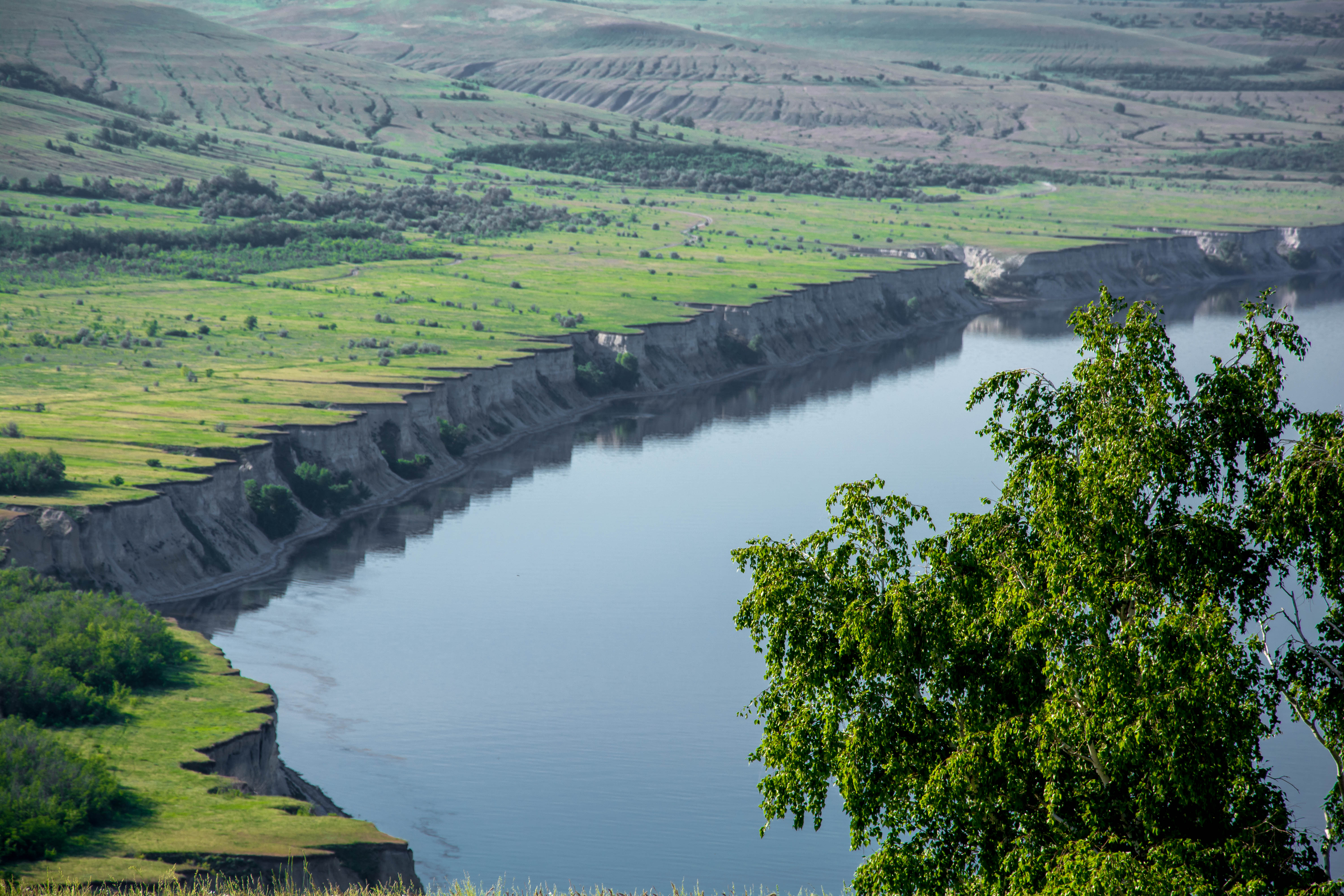 Урочище Дурман гора, Красноармейский район This image is related to the protected area of Russia number 6410086